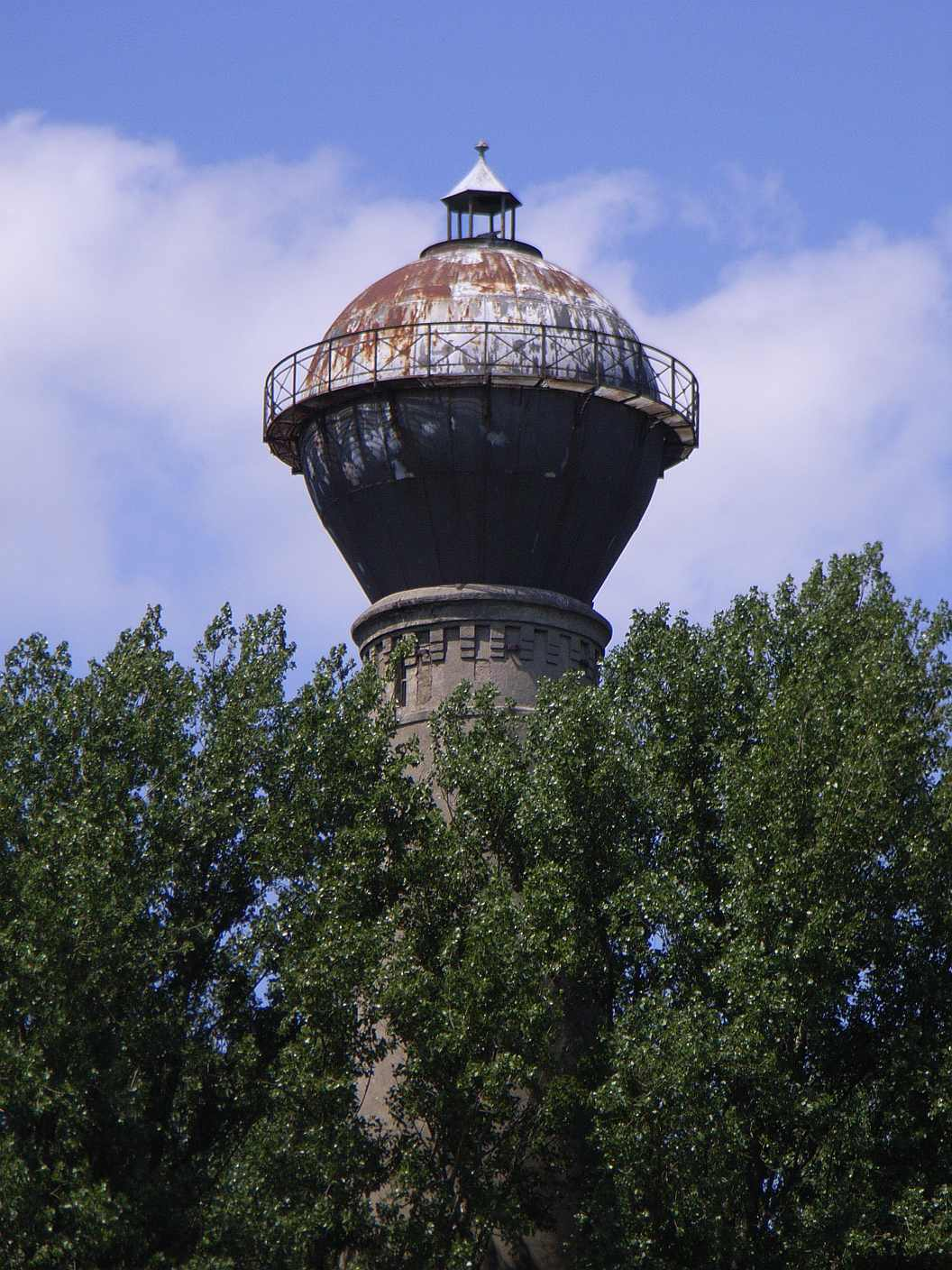 Wasserturmbehälter Jüchen-Holz (alt)